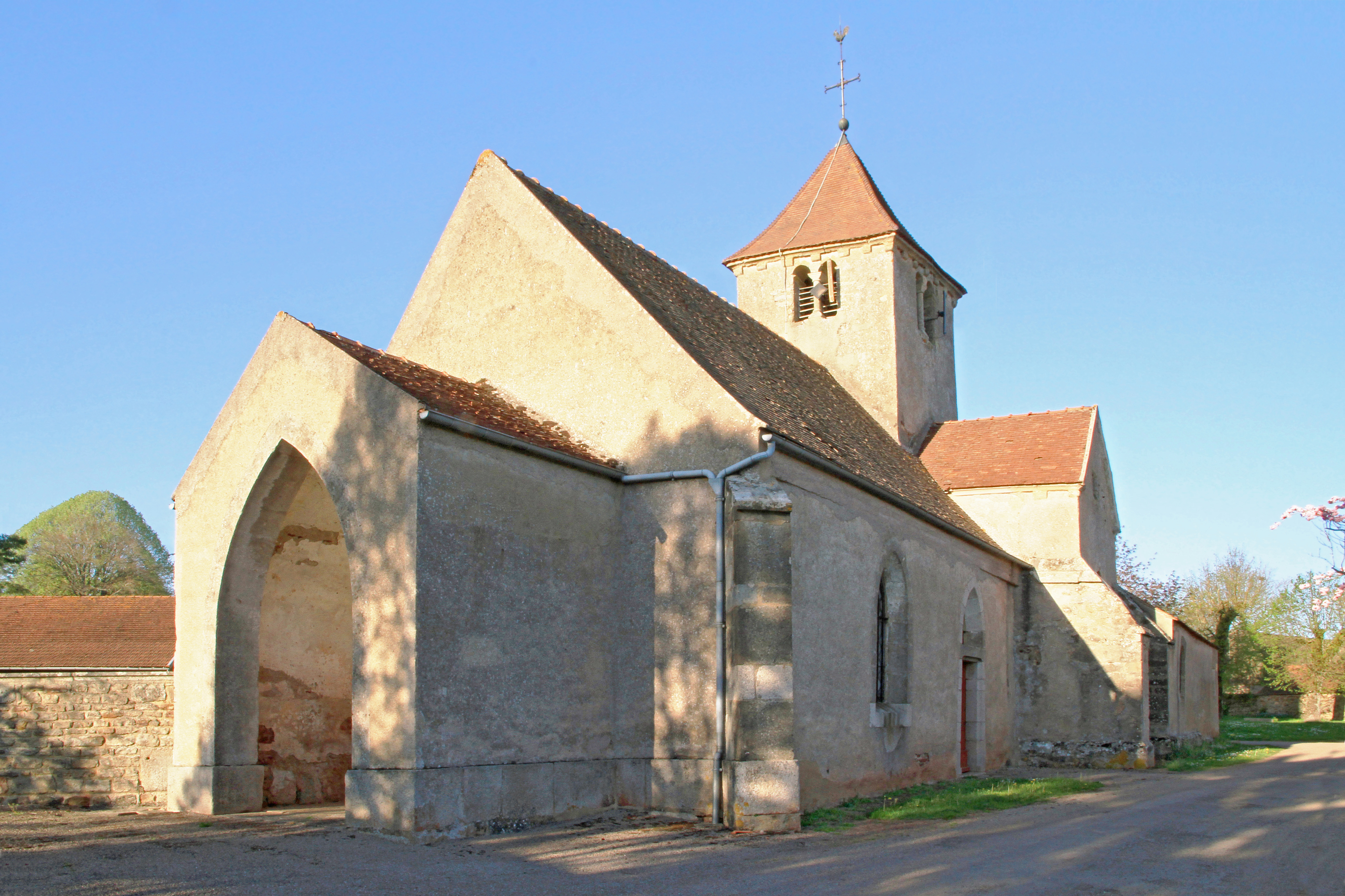 Façade et porche de l'église Sainte-Croix de Thoste